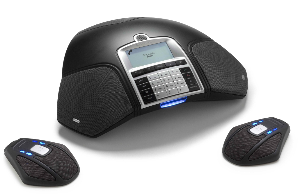 Конференц-телефон Konftel 300